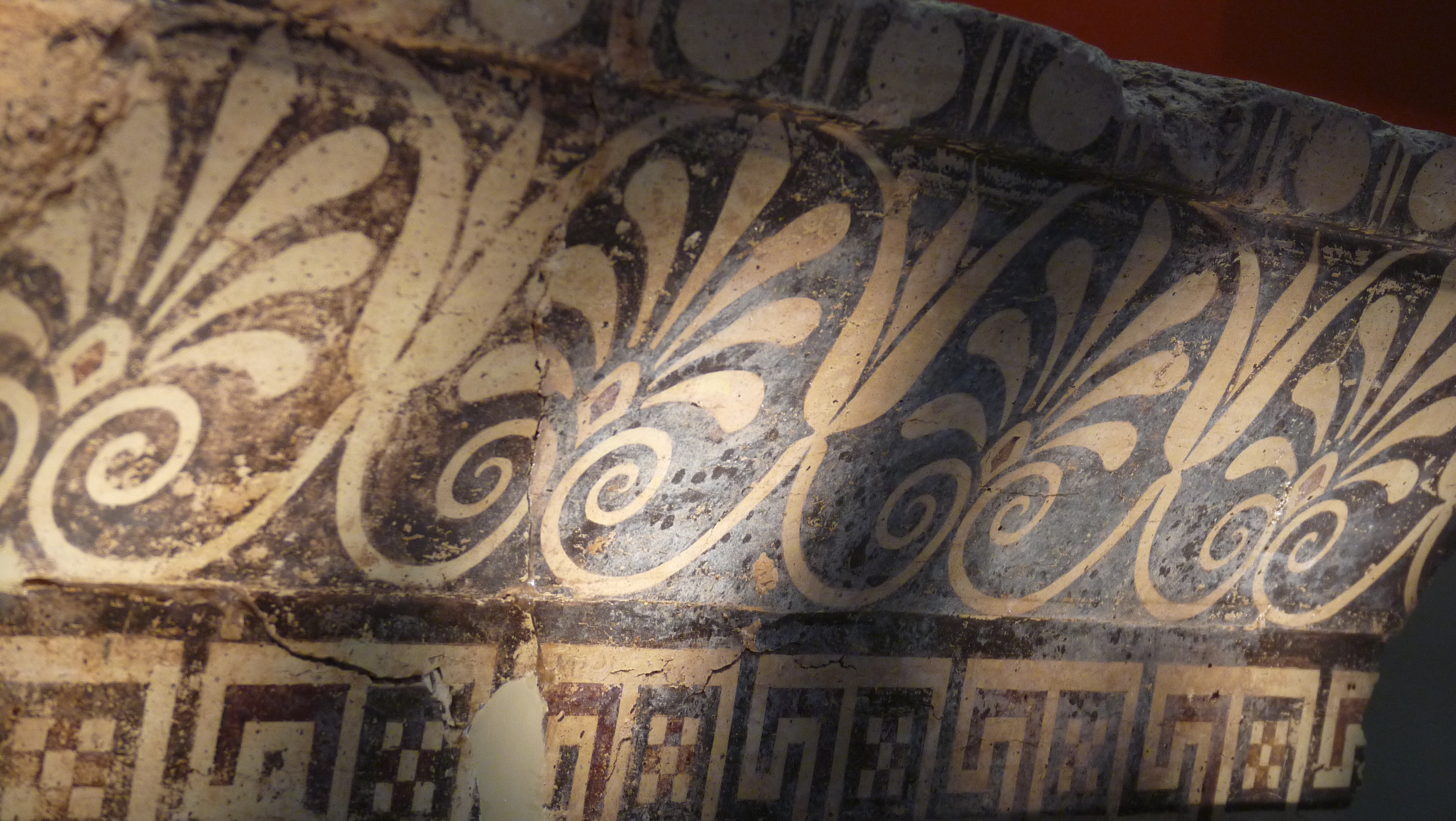 38°28′53.4″N 22°29′46.2″E